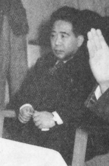 有田二郎（逮捕の朝）